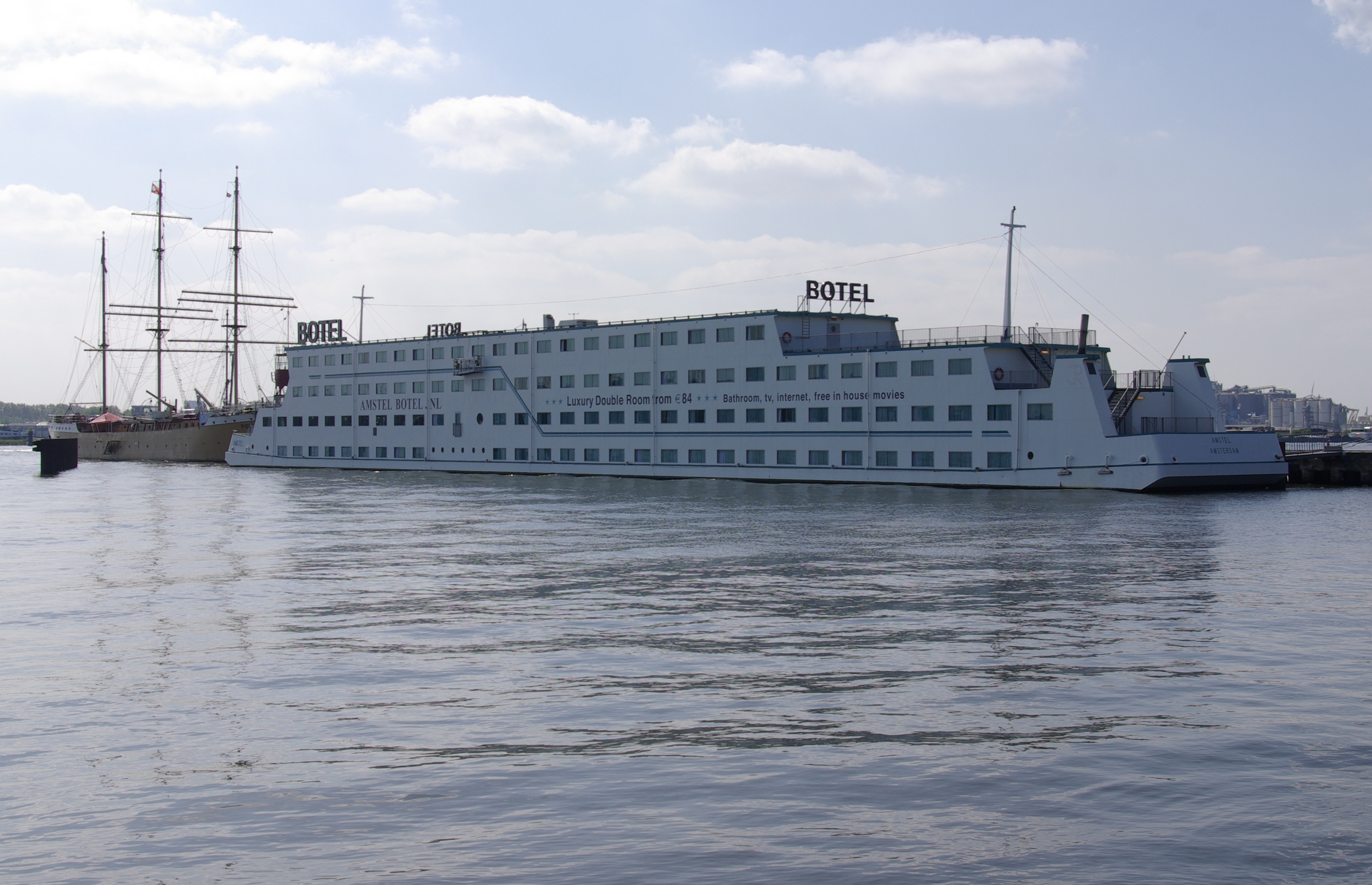 Amstel Botel in Amsterdam-Noord